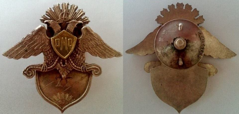 Юбилейный знак Особого Маньчжурского Отряда (OMO) в честь его 20-летия. Серебро, золочение; Харбин (Китай), 1937 год.